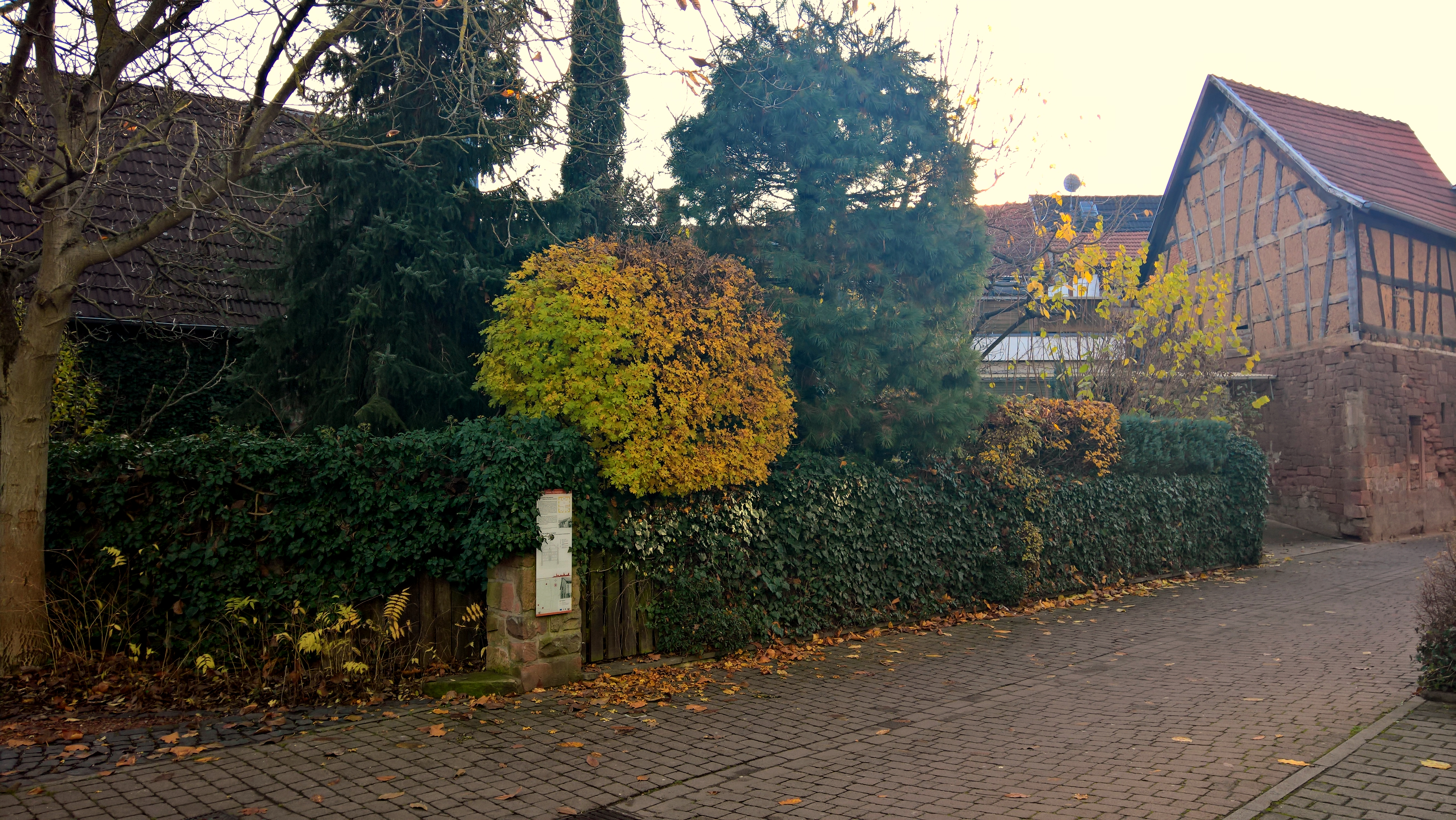 Ehemaliger Standort der Neuen Synagoge am alten Standort in Groß-Umstadt (diese befindet sich heute im Hessenpark).